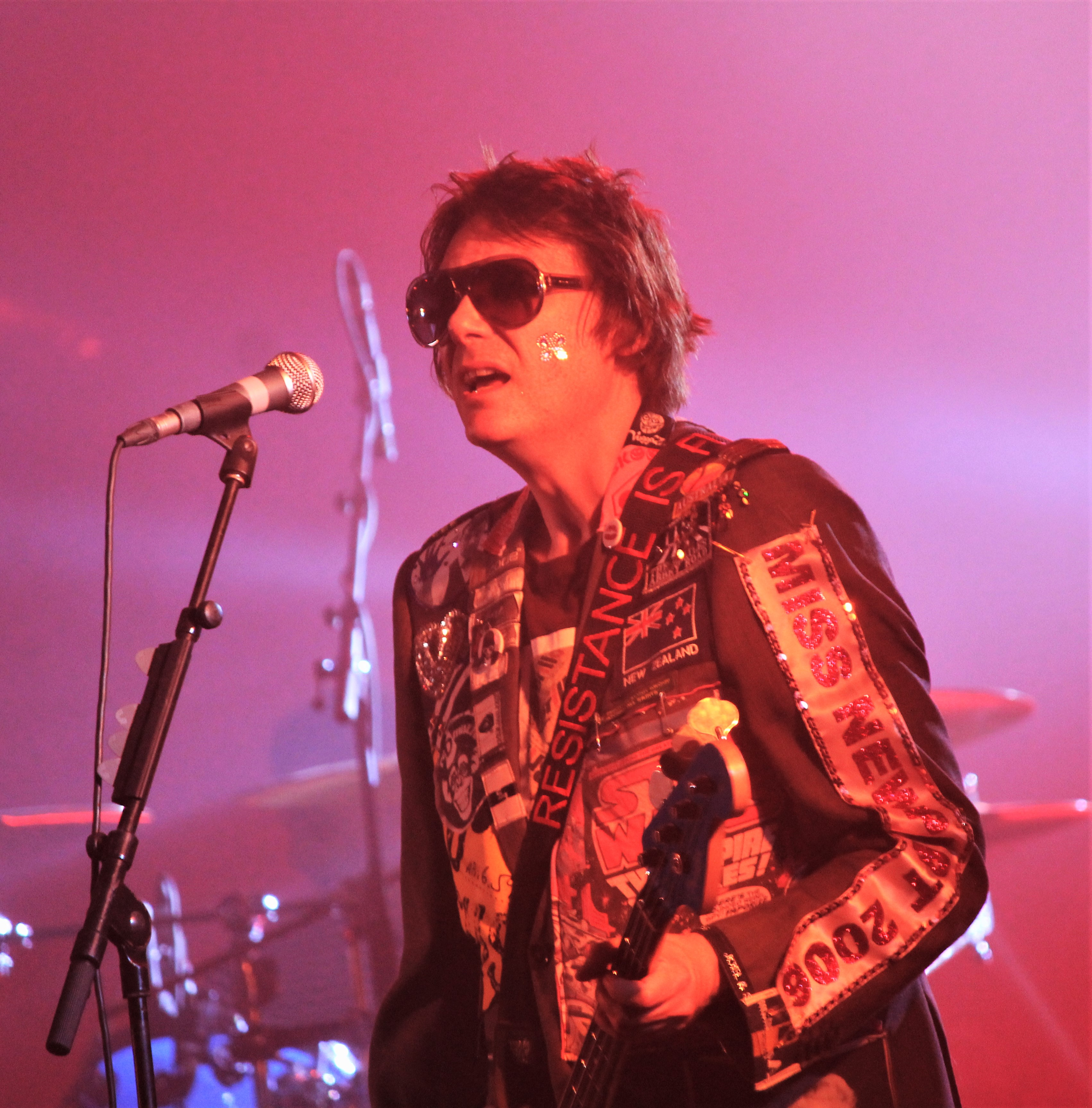 Concert des Manic Street Preachers lors du festival interceltique de Lorient 2018.